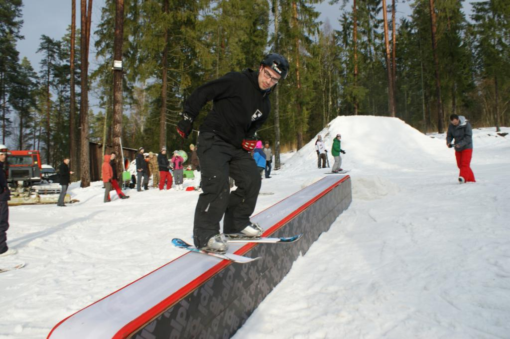 Райдер Skiboarder Team Russia - Никита Кузнецов, слайд по боксу